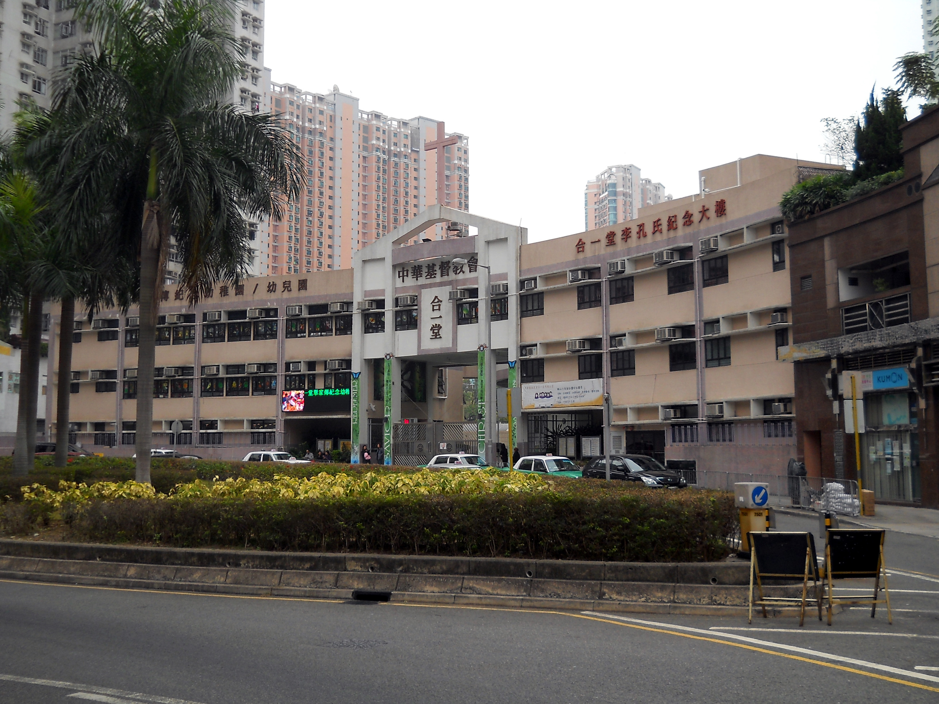 中文（香港）: 合一堂馬鞍山堂